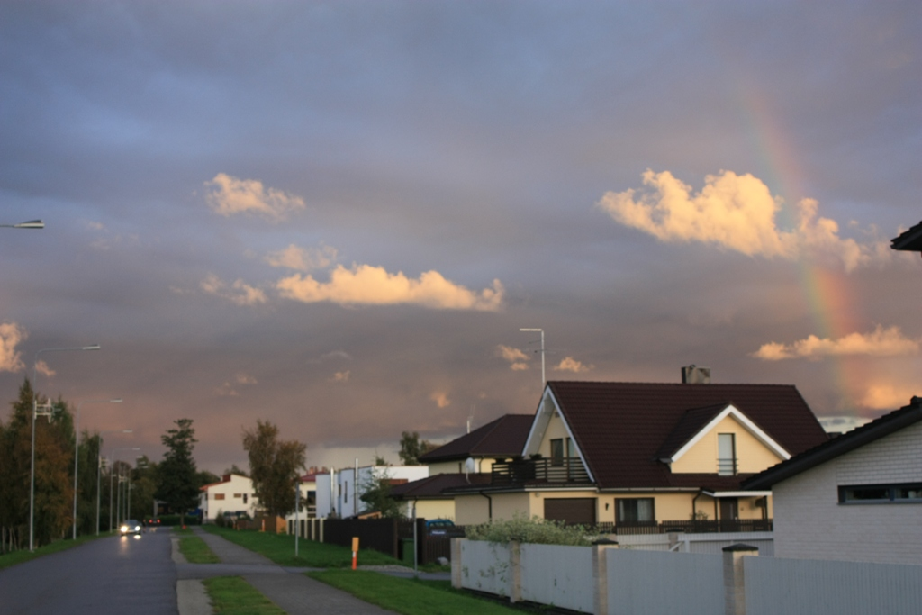 Street in Kakumäe, Tallinn, Estonia.